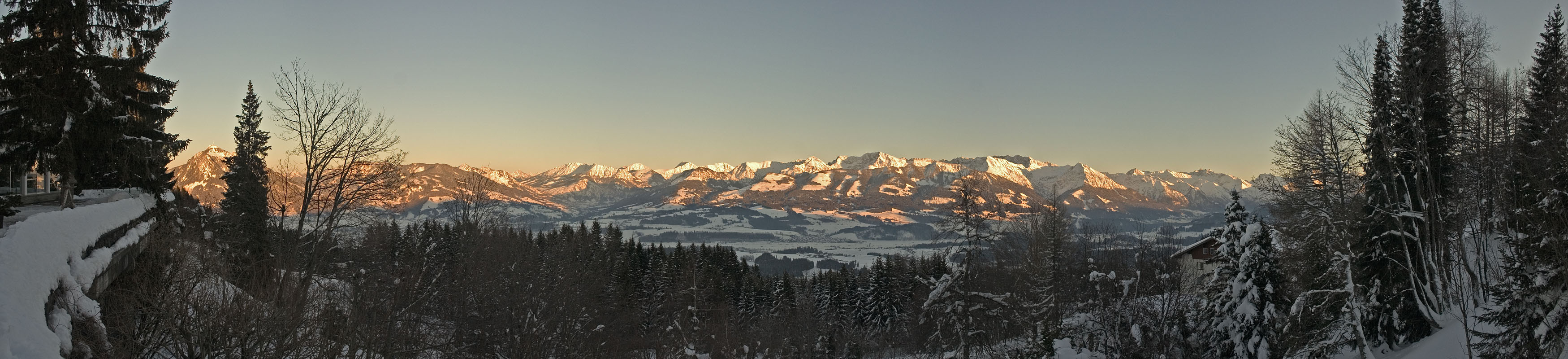 Alpenglühen. Panoramablick vom Allgäuer Berghof (Gemeinde Blaichach) bei Sonthofen